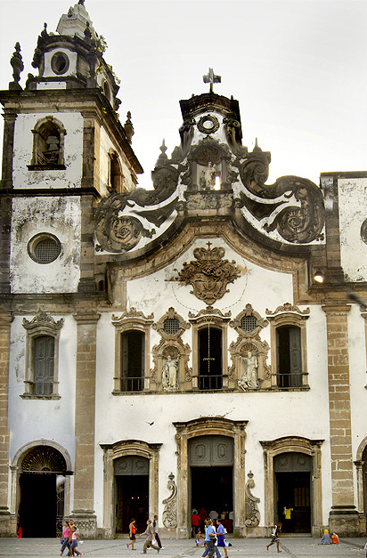 Basílica de Nossa Senhora do Carmo, Recife, Pernambuco, Brasil.